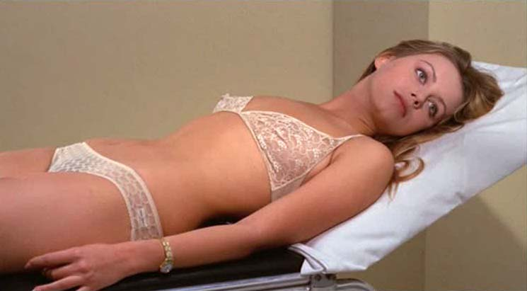 Screenshot di Gloria Guida nel film La minorenne, 1974, regia di Silvio Amadio.